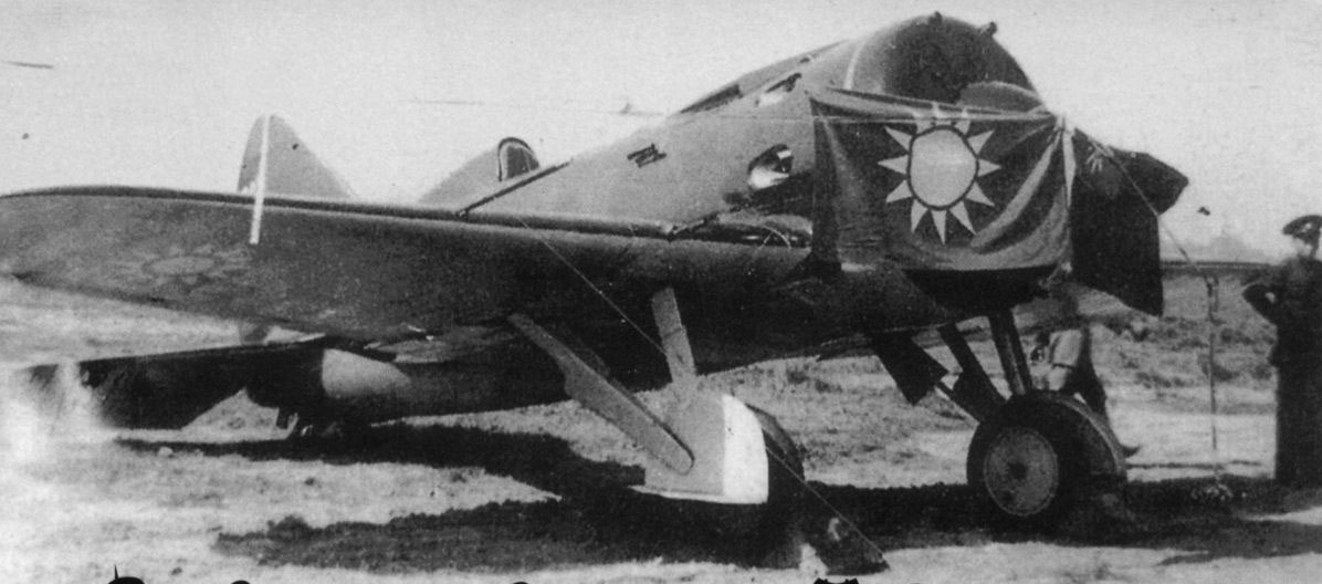 抗戰期間來華助戰的蘇聯空軍義勇軍I-16戰鬥機。